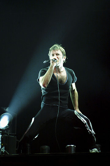 Bruce Dickinson, fotografiert am 21.09.1999 bei einem Konzert von Iron Maiden in Stuttgart, Hanns-Martin-Schleyer-Halle